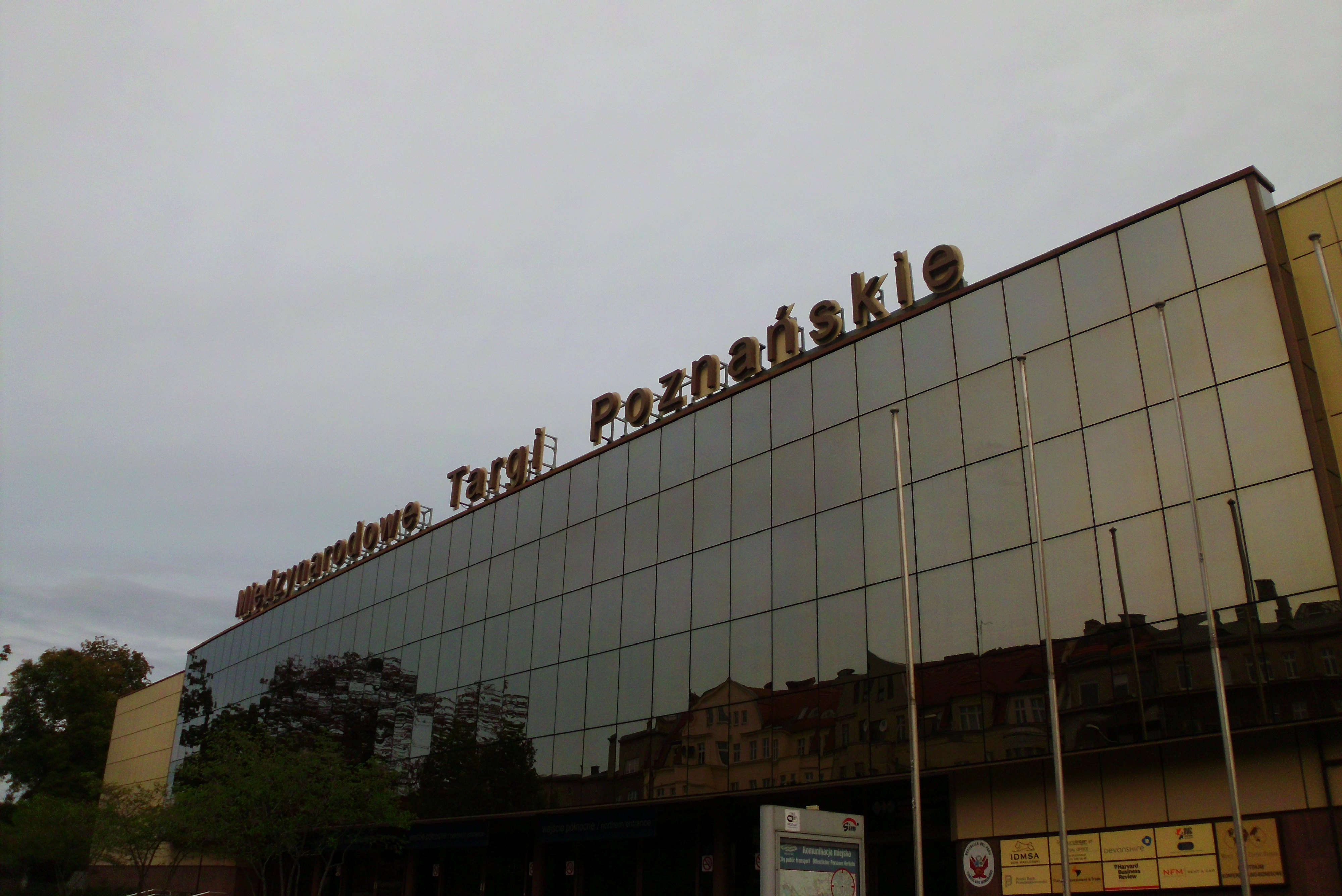 23.08.2014 Wycieczka z cyklu "Miasto zaginione" - MTP